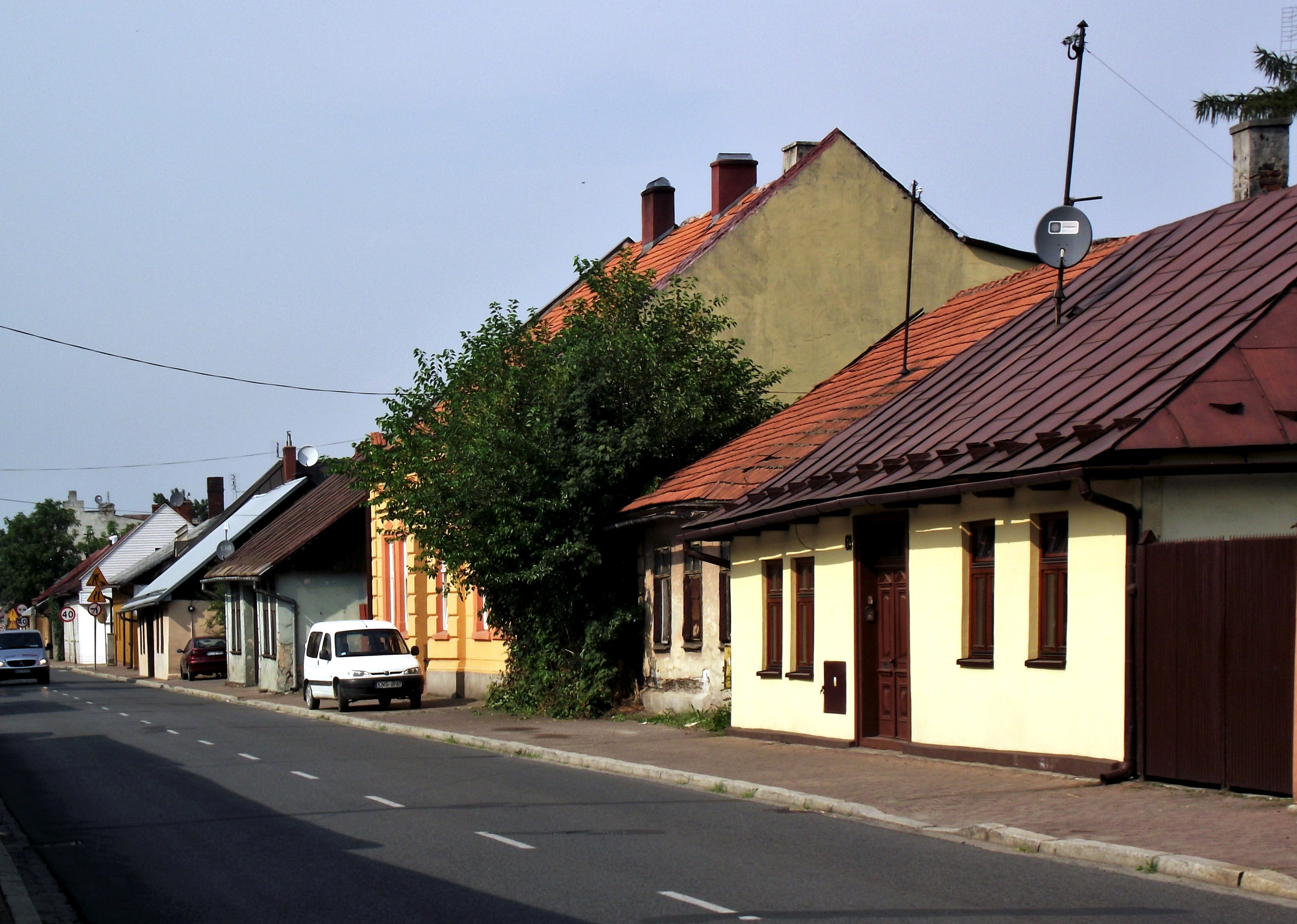 Stary Sącz, ulica Jana III Sobieskiego.